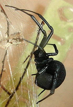 Latrodectus lilianae